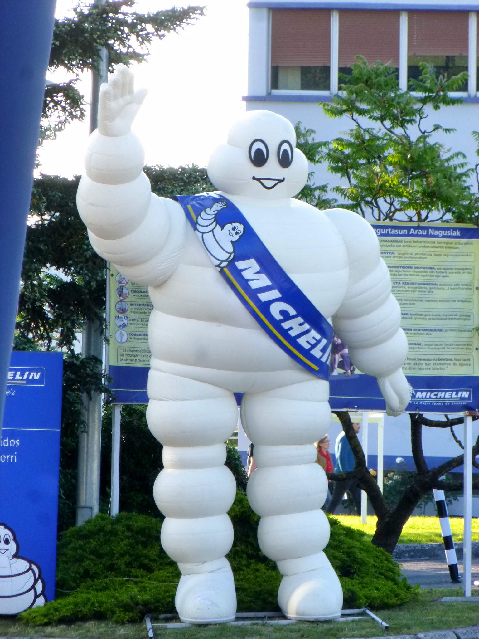 Vitoria - Fábrica SAFEN Michelín